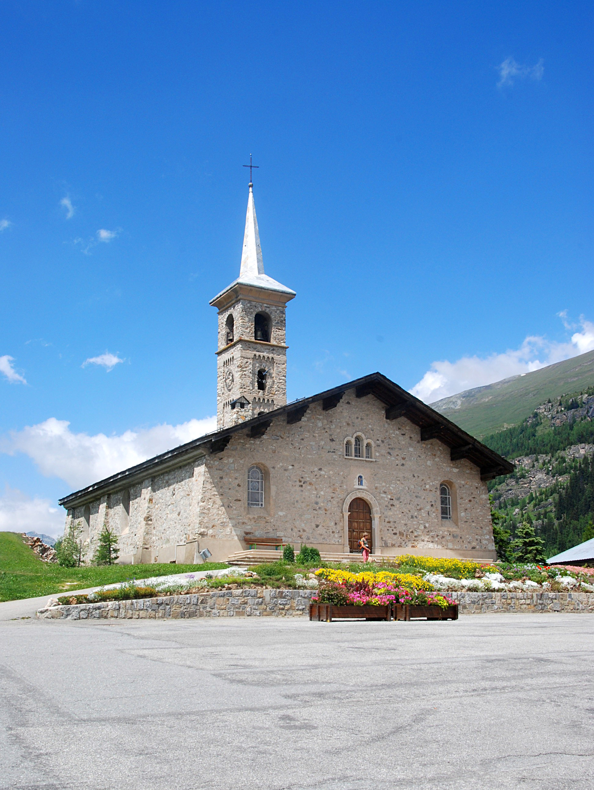 Tignes (73)